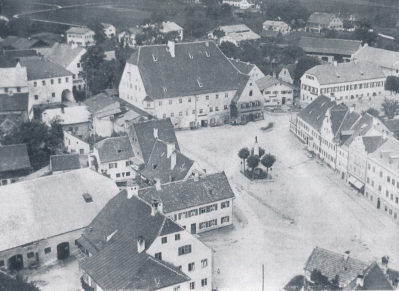 Ebersberger Marktplatz um 1900